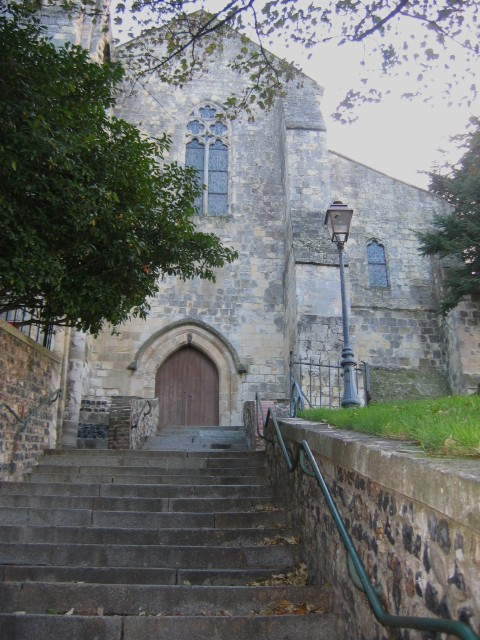 Abbaye de Graville, Le Havre